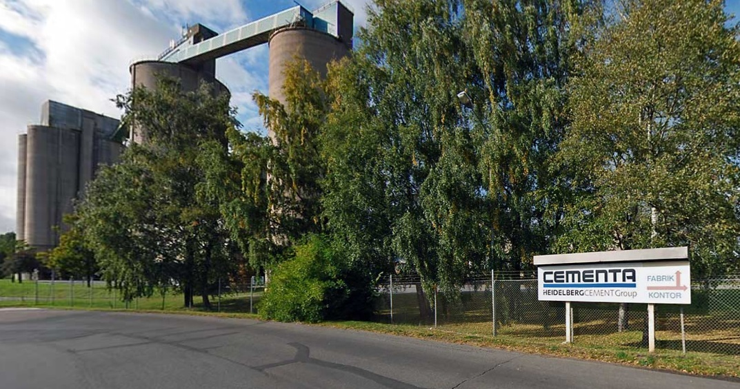 Cementa i Skövde